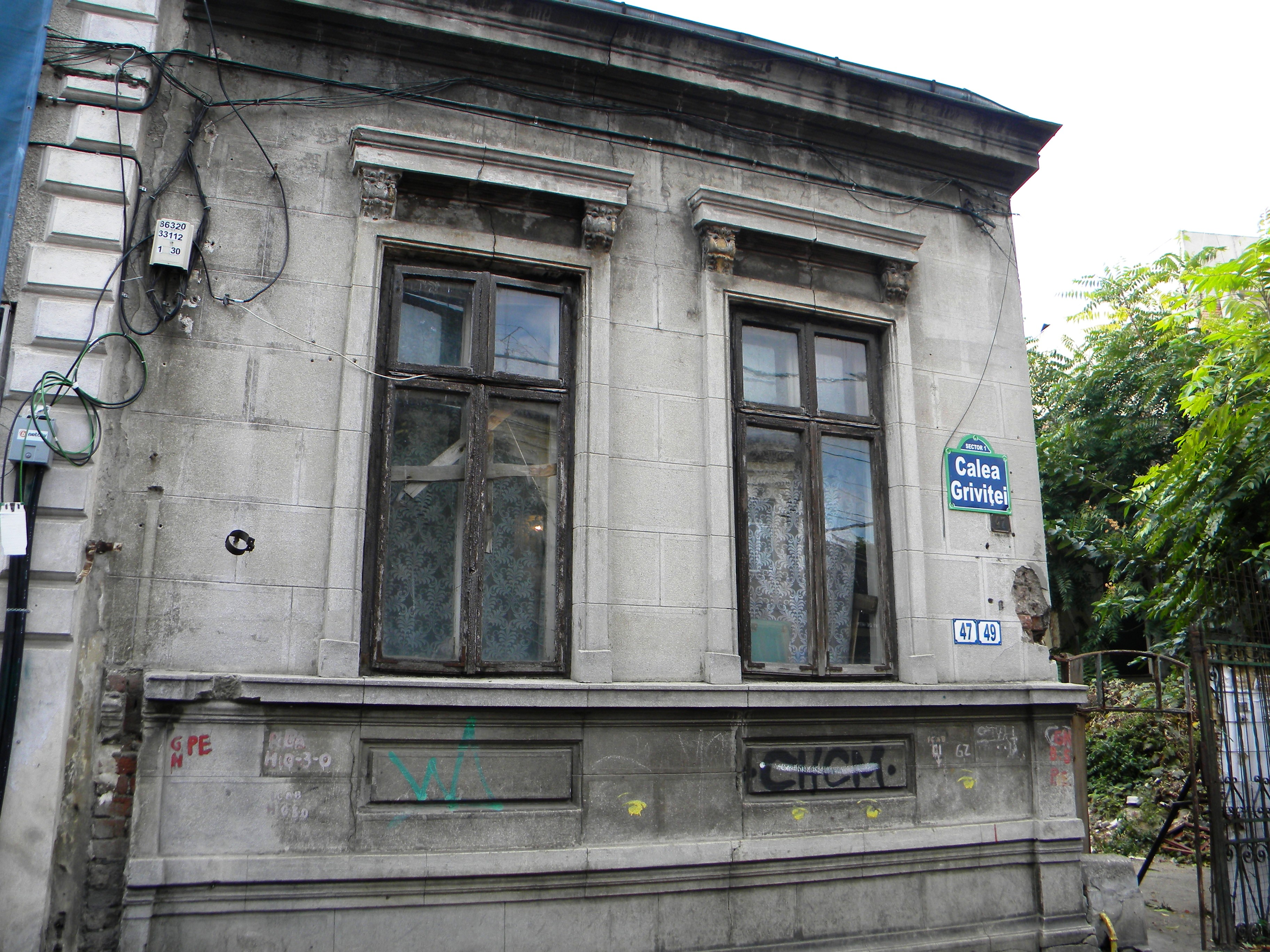 Bucuresti, Romania, Casa pe Calea Grivitei nr. 47, 49, sect. 1